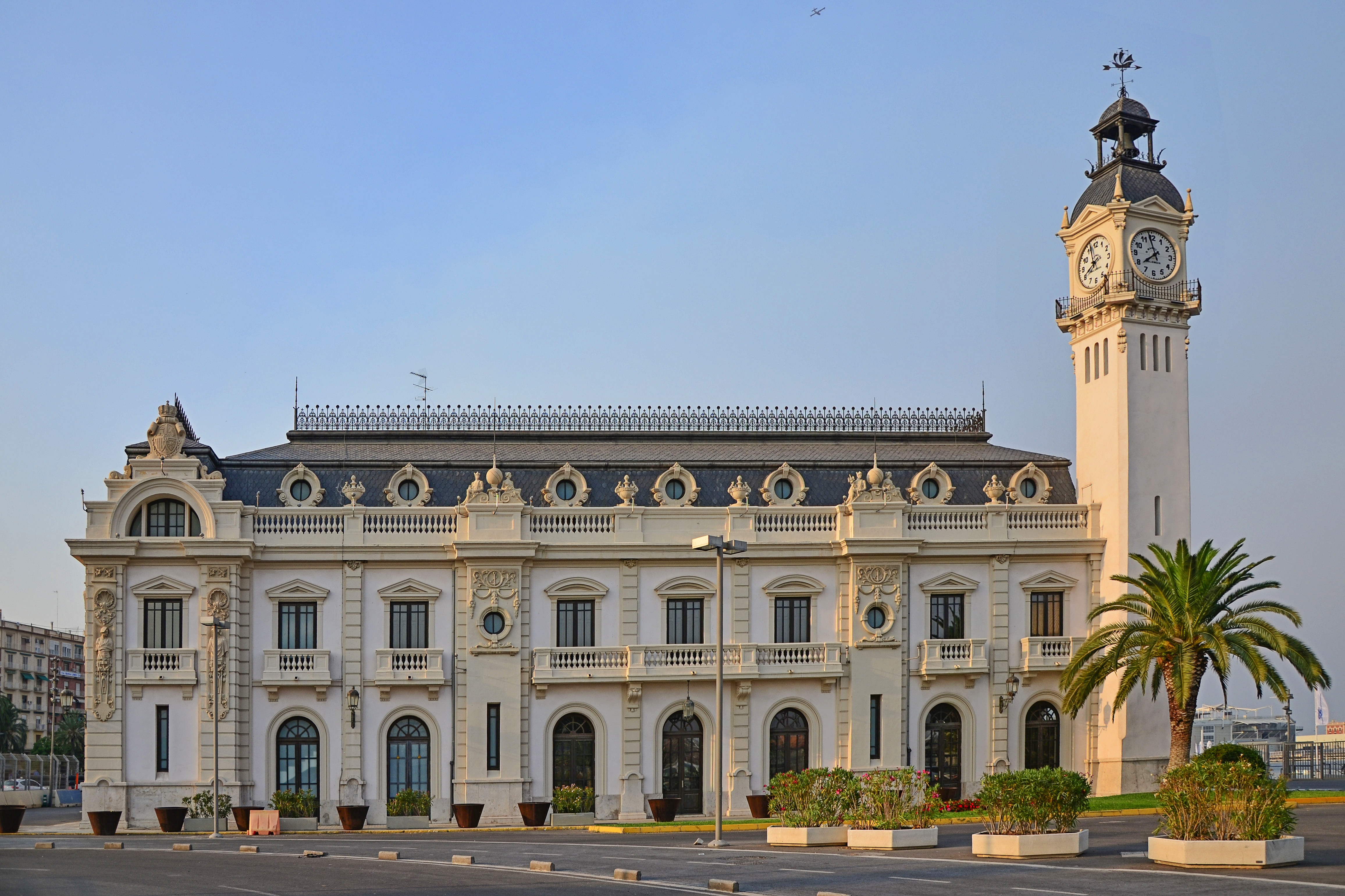 Edificio del Reloj, 15.250-360.